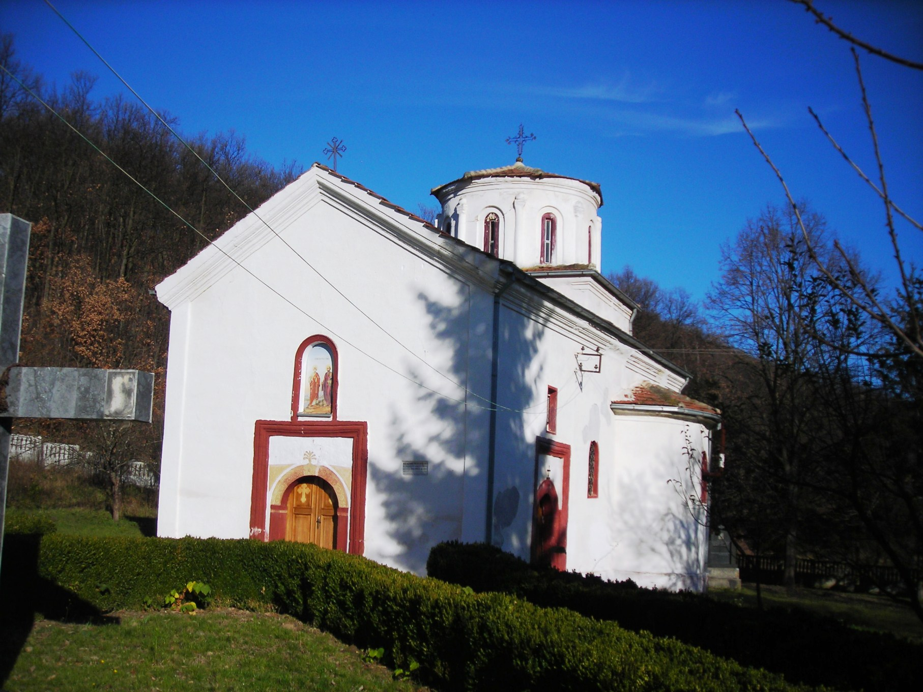 Црква св Петра и Павла у Грабову (Ражањ) - St Peter and Paul Church in Grabovo (Ražanj).JPG